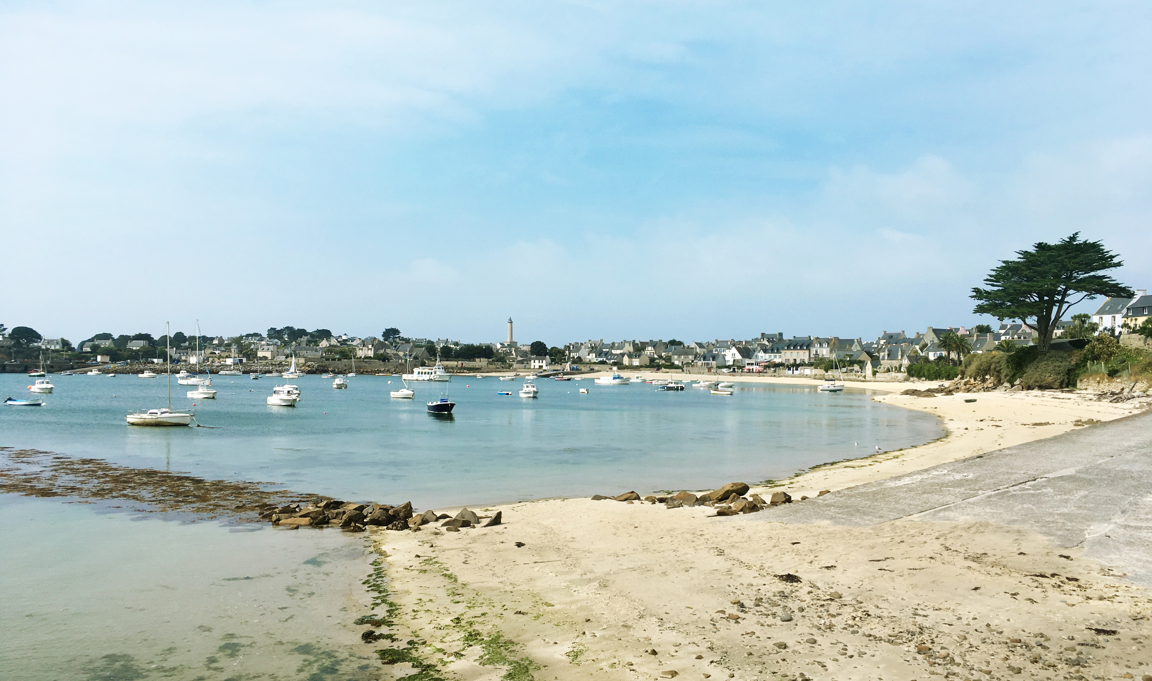 Vue sur les lieux-dits de Rupodou et de Porz Kernok sur l’île de Batz.